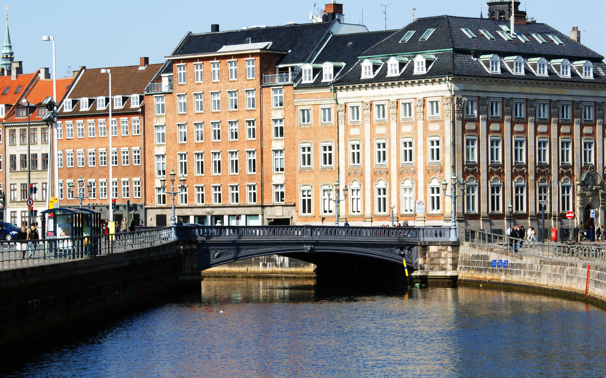 Højbro - bro i København, Denmark